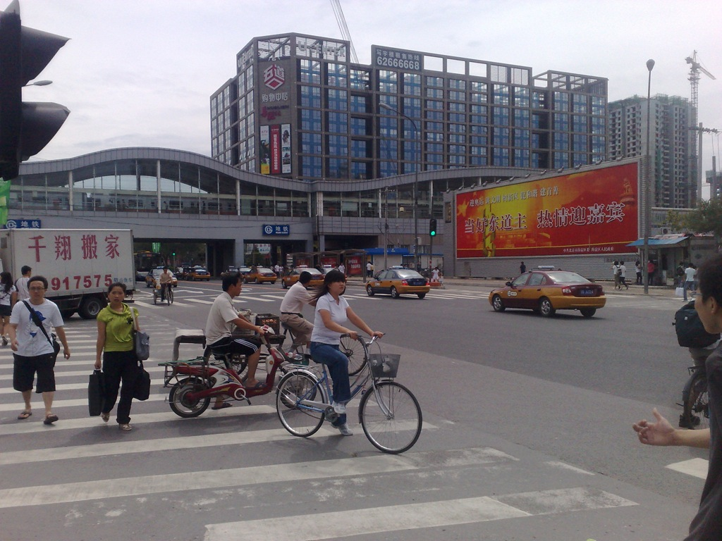 北京地铁十三号线五道口站